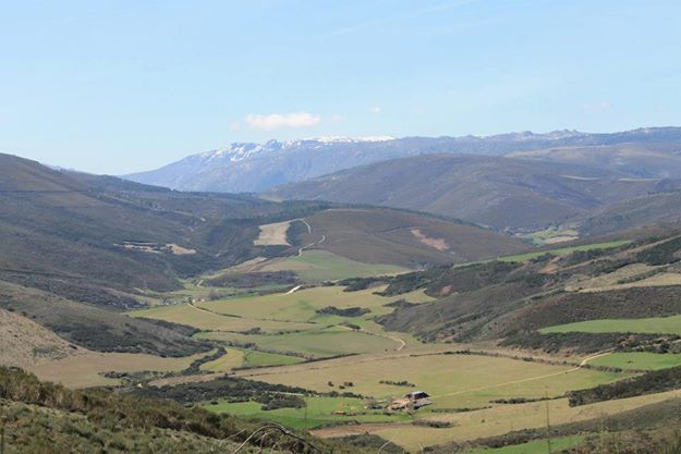 Vista para sul dos Casais de Folgosinho, com quintas, e a vista para o Vale Inicial do Mondego. No horizonte, a Torre (Sul).